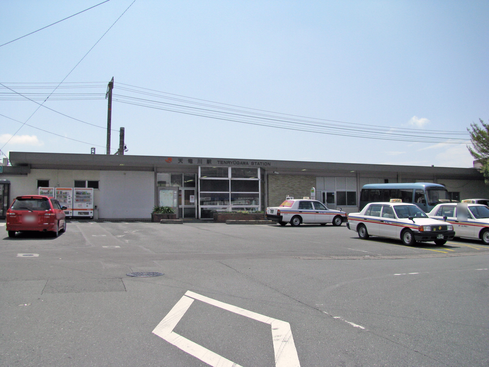 東海道本線天竜川駅